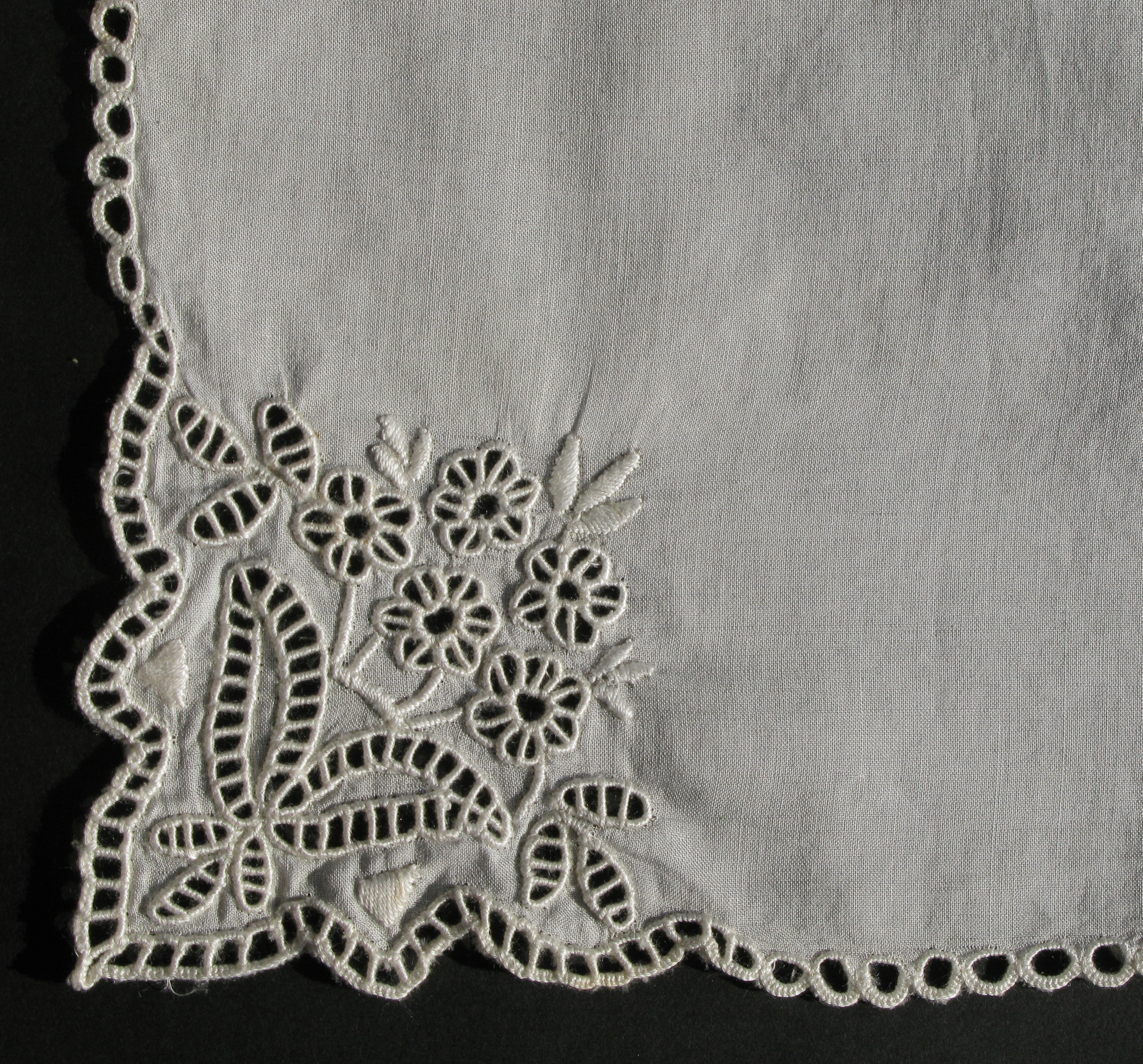 Mit Lochstickerei verziertes Taschentuch